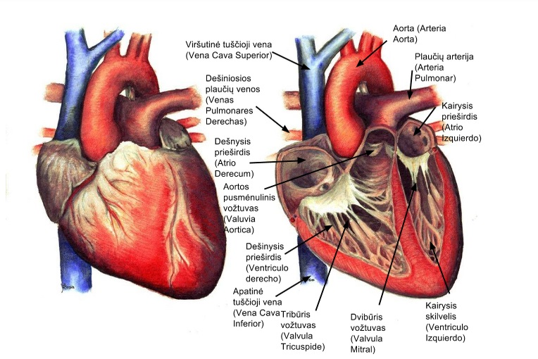 Širdies sandara